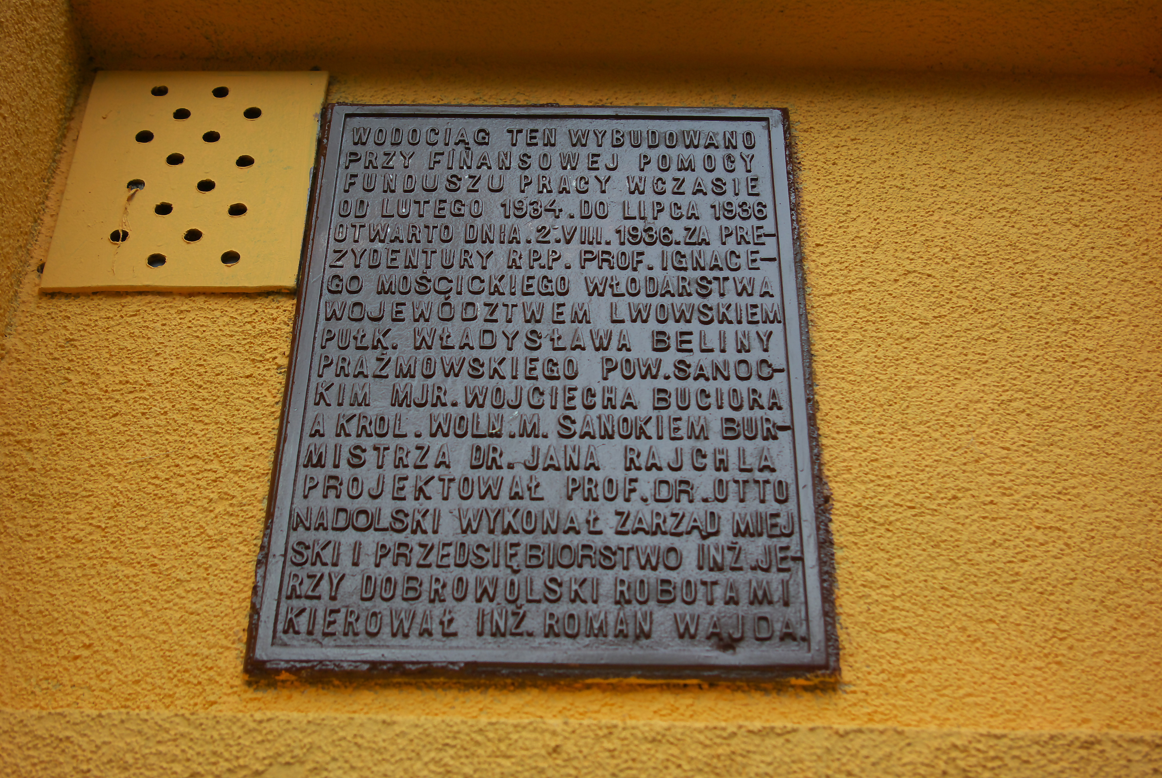 Tablica pamiątkowa poświęcona uruchomieniu wodociągów miejskich z 1936 roku. Budynek zbiornika retencyjnego wodociągów miejskich w parku miejskim im. Adama Mickiewicza w Sanoku. Odmalowany we wrześniu 2012 roku.